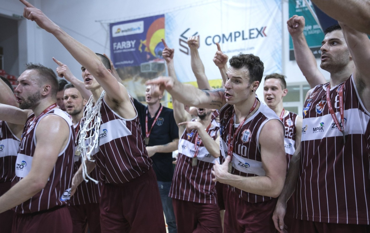 Spójnia Stargard mistrzem I ligi (17.05.2018)